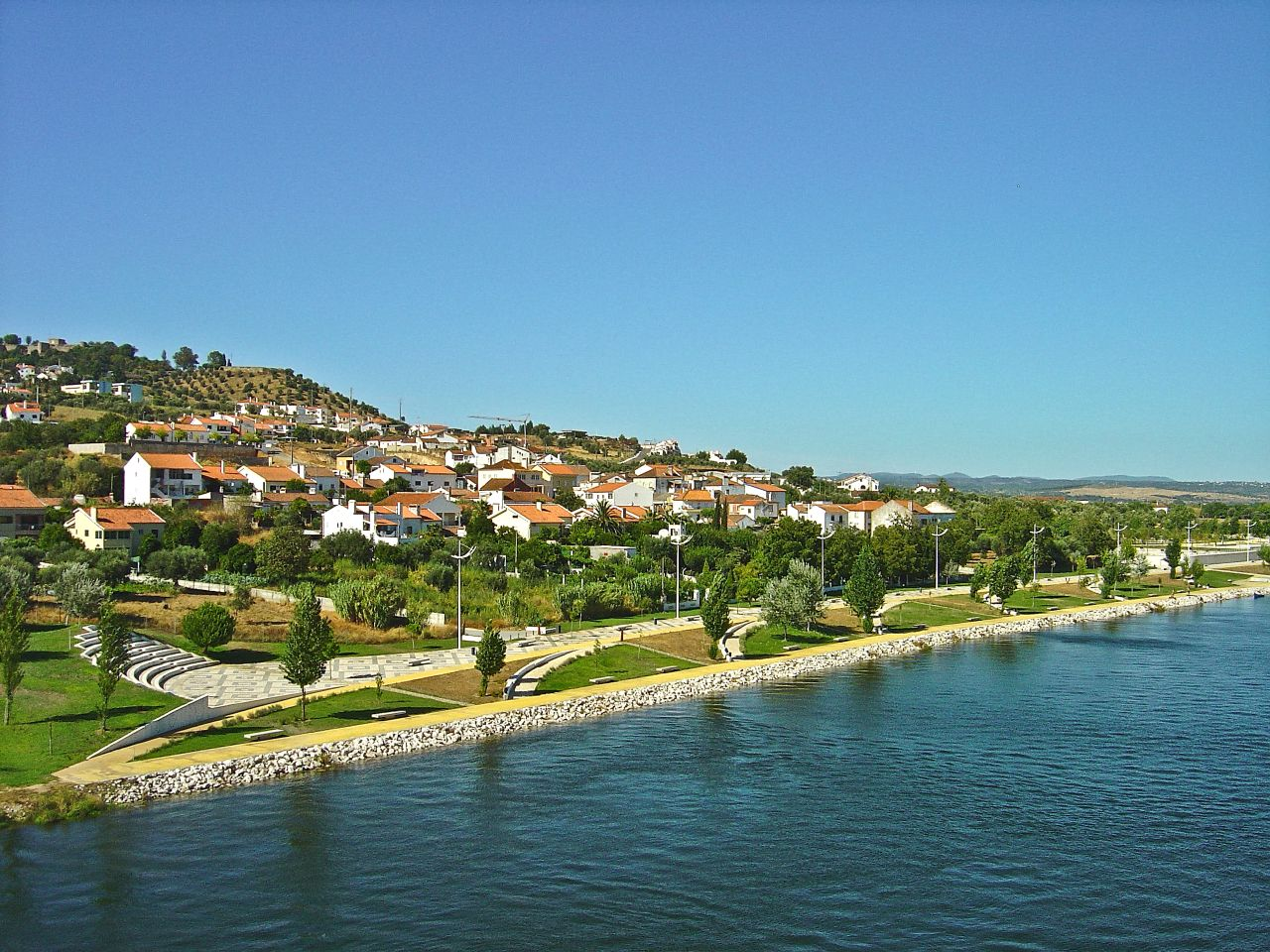 O Aquapolis – Parque Urbano Ribeirinho é uma área requalificada, situada nas duas margens do Tejo, pensada para se olhar e fruir o rio na sua passagem por Abrantes. Constitui um novo espaço de recreio, lazer e convivência social que veio revitalizar o que há décadas se perdeu: a ligação activa da cidade com o Tejo. Abrangendo uma área total de, aproximadamente, 85 hectares – 23 hectares na zona norte, 13 hectares na zona sul e 50 hectares no rio –, esta zona ribeirinha é formada por um conjunto de infra-estruturas vitais para o desenvolvimento das suas potencialidades. See where this picture was taken. [?]